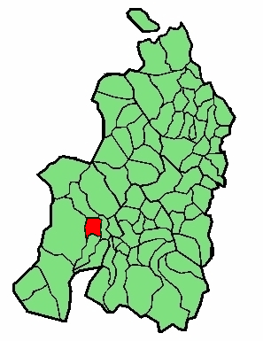 Irulegi udalerriaren kokapena nafarroa behereran